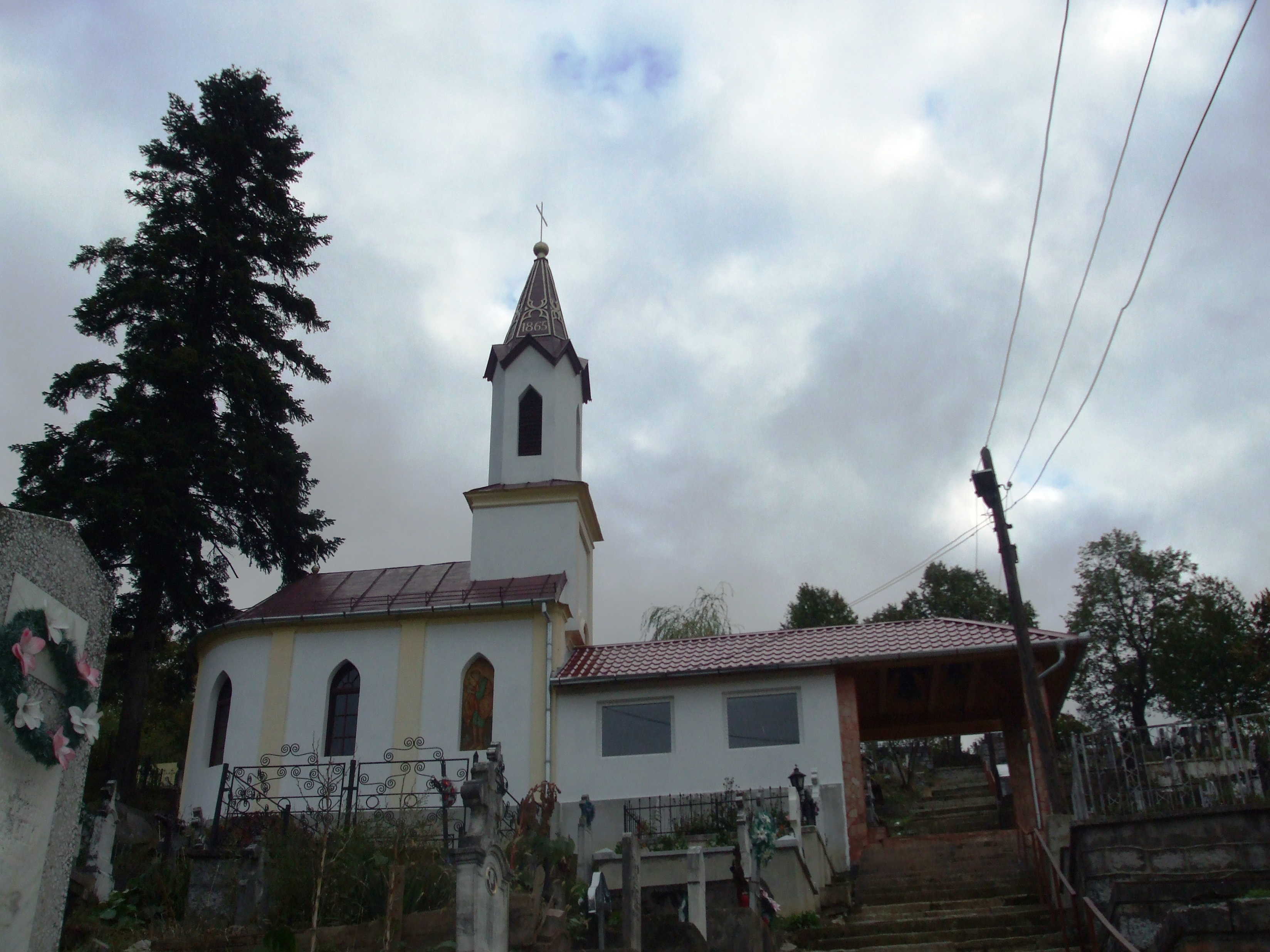 DSCF62 1.7 MB